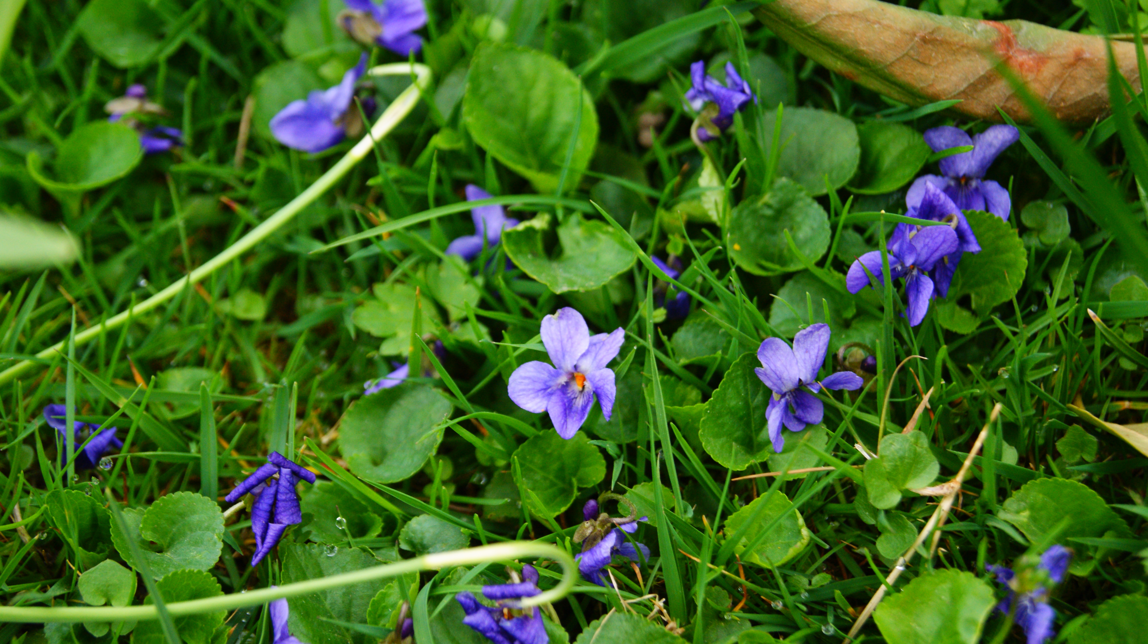 Veilchen im Frühling